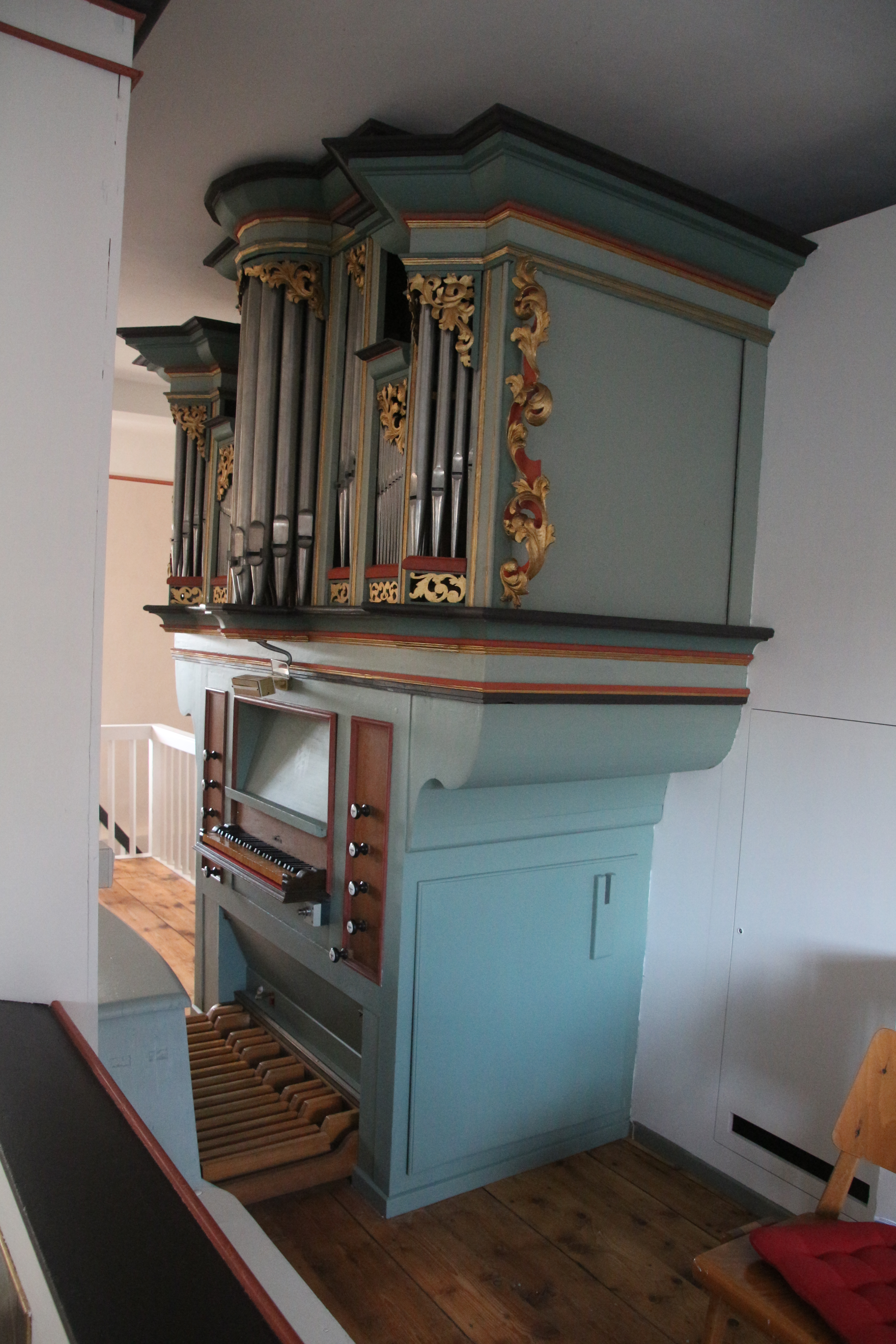 Evangelische Kirche Sterzhausen, Gemeinde Lahntal, Landkreis Marburg-Biedenkopf, Hessen